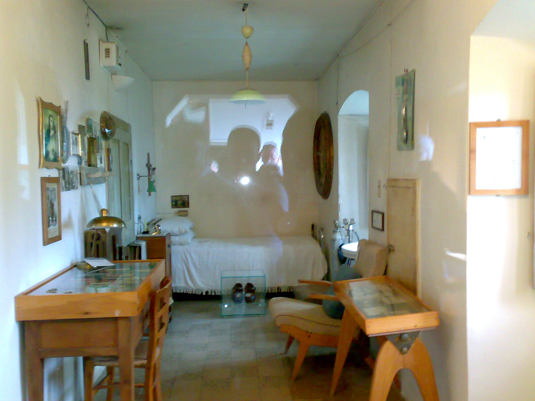 Cella di San pio